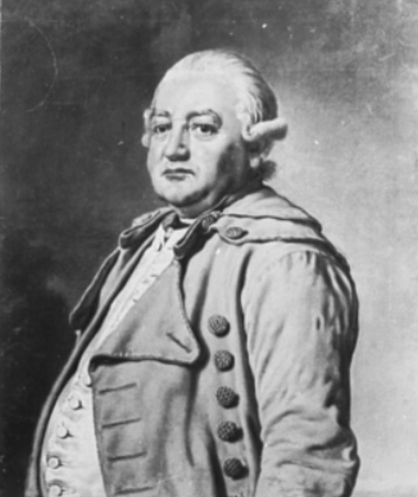 Franz Balthasar Schönberg von Brenkenhof (* 15. April 1723 in Reideburg b. Halle; † 21. Mai 1780 in Karzig b. Friedeberg a. W.), preußischer Beamter und Staatsmann